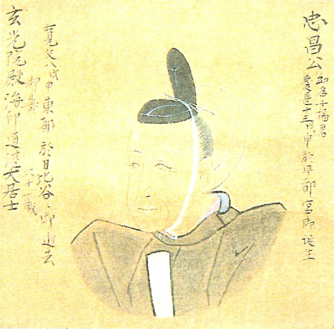 奥平忠昌の肖像。